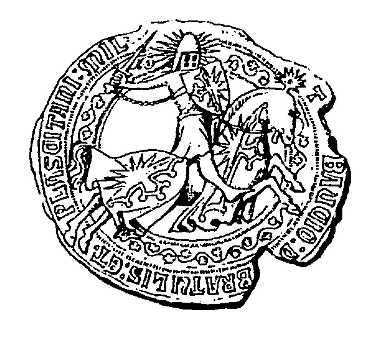 Sceau d'Agout des Baux